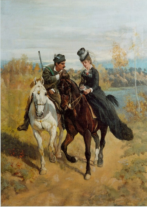 Zwei Reiter